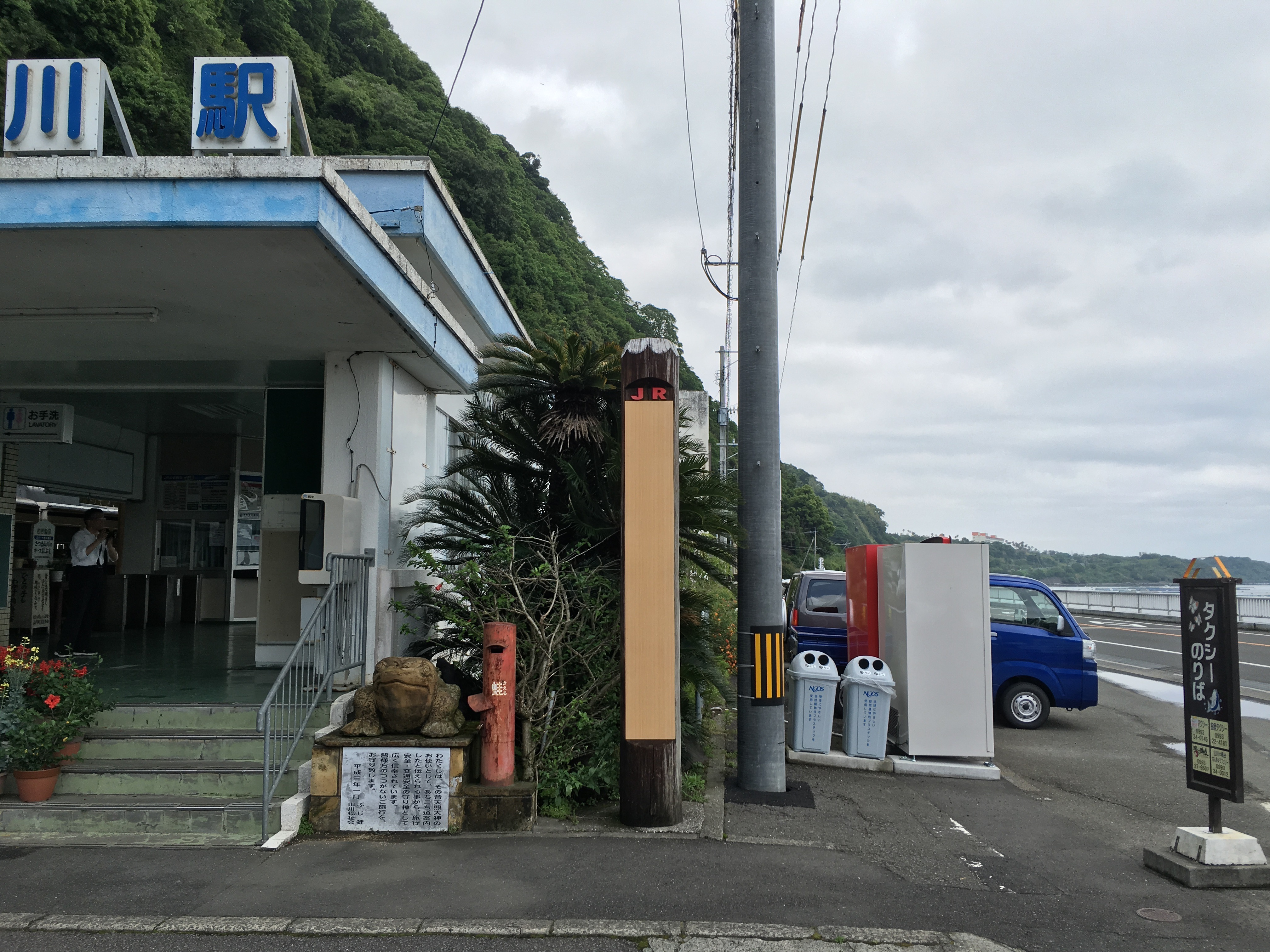 山川駅日本最南端の有人駅標柱